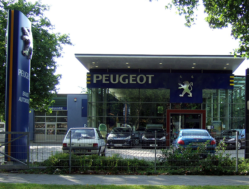 Peugeot Händler bei Darmstadt